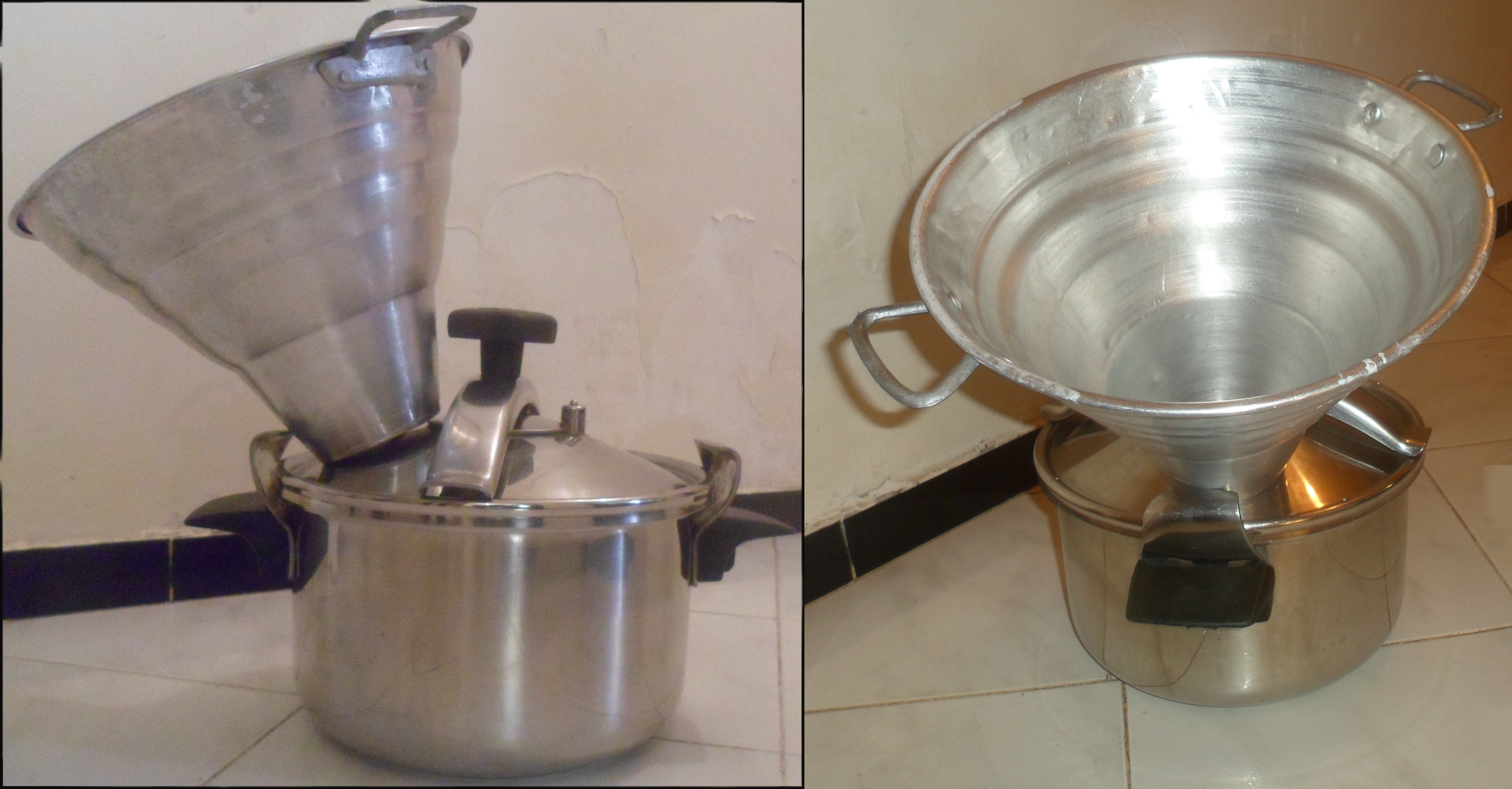 كسكاس تقليدي